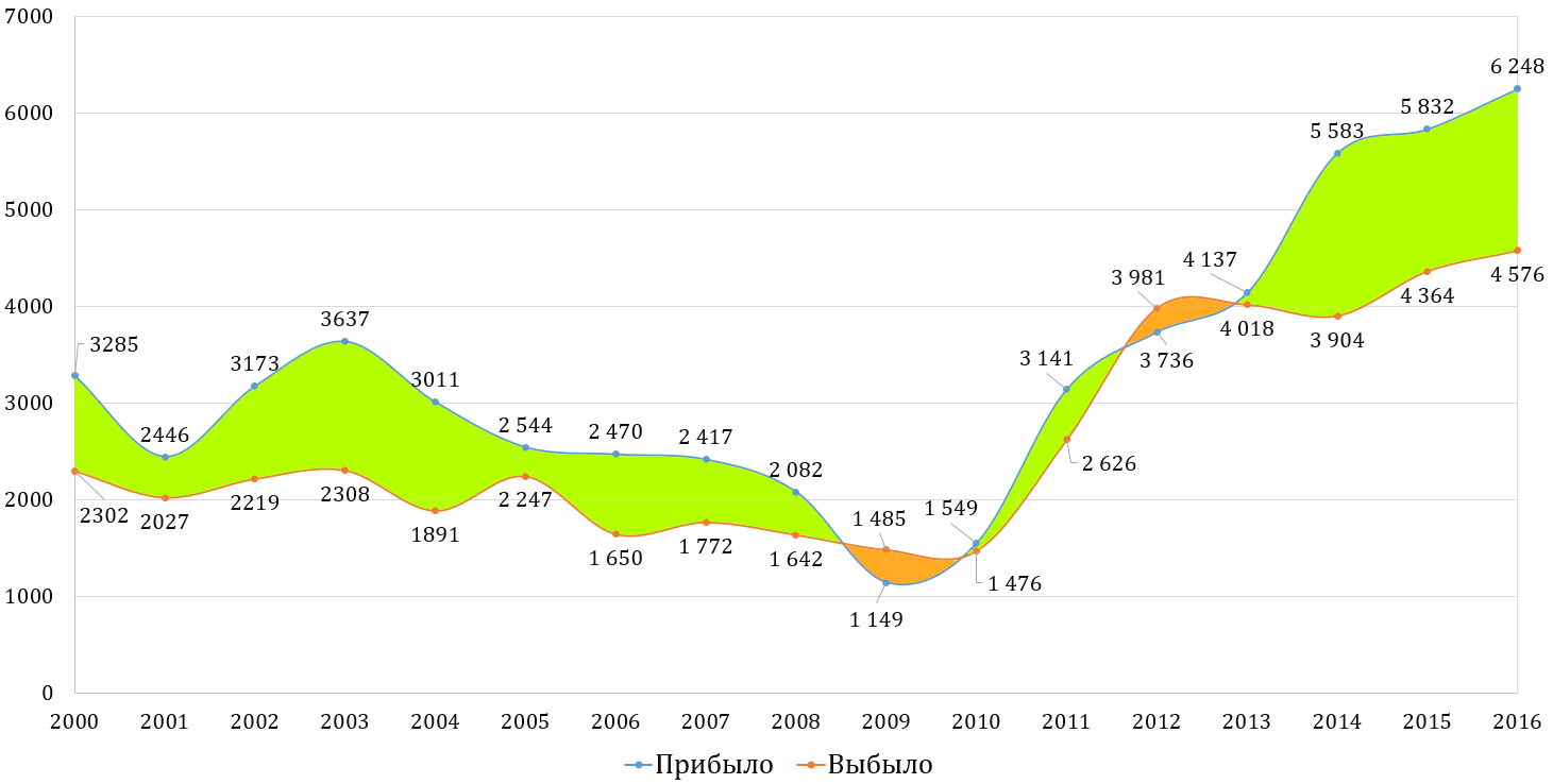 Прибывшие, выбывшие г. Артёма 2000-2016